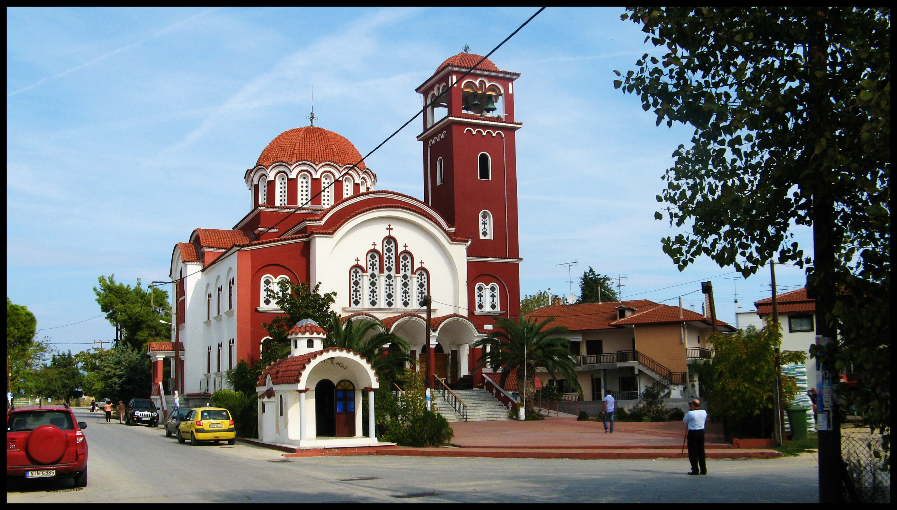 Храм у Јерисосу